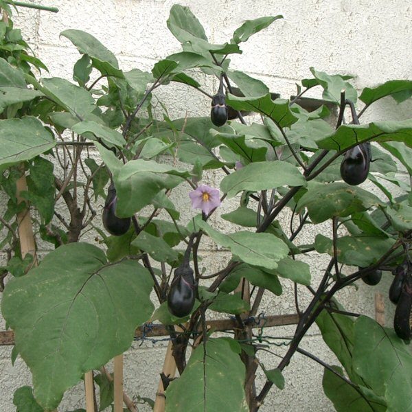 Eggplant:ja:ナスの花と実